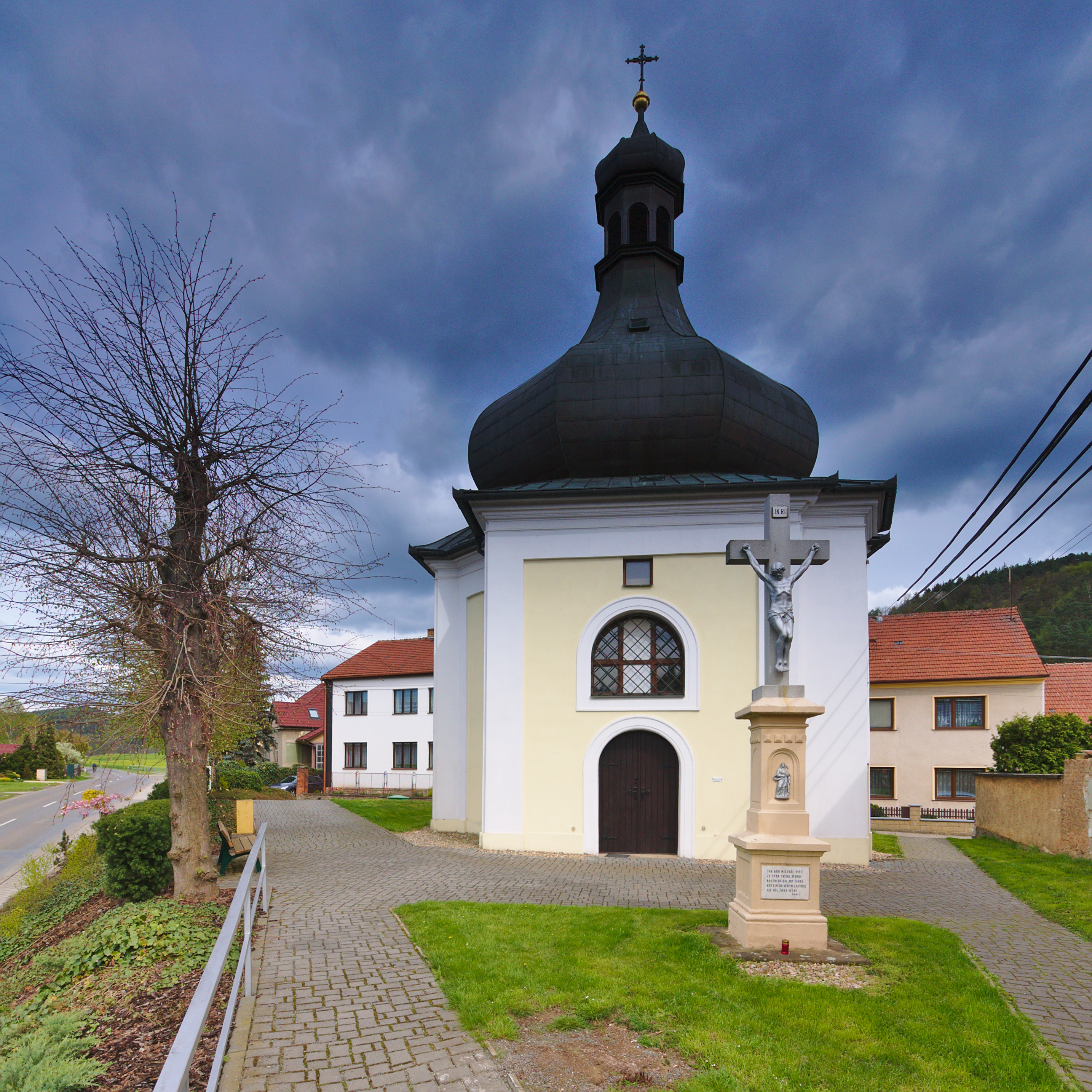 Kostel svatého Vavřince, Lhota Rapotina, okres Blansko